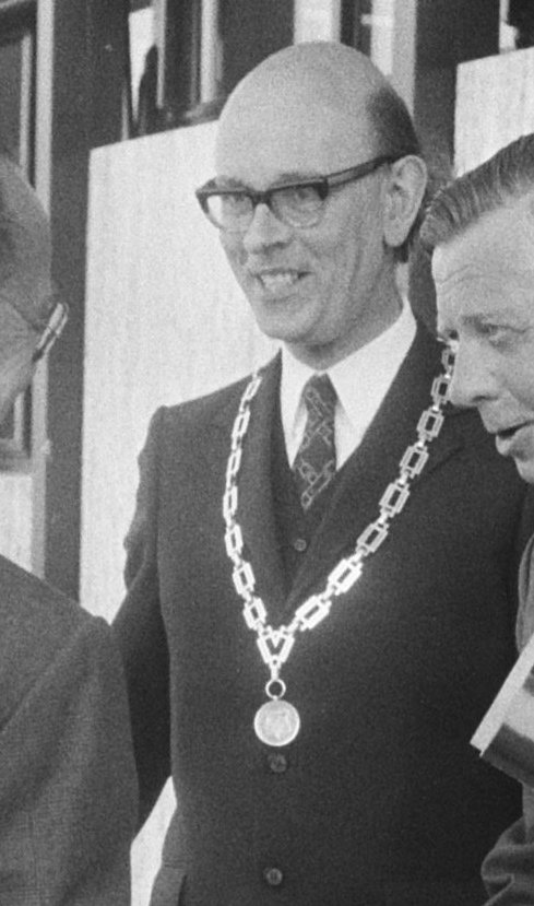 Aankomst van prins Bernhard, in het midden met ambtsketting burgemeester Kastein